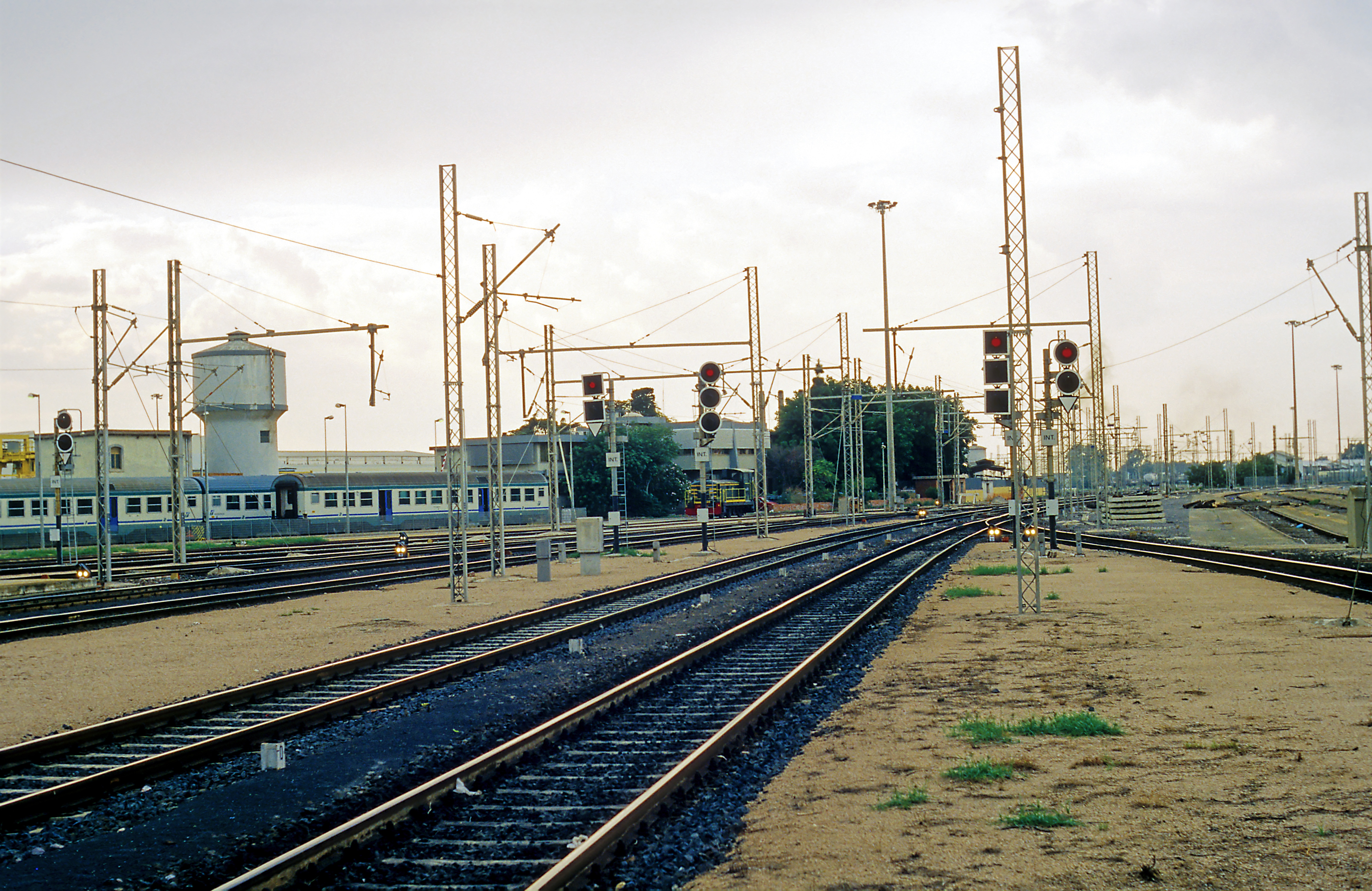 Richtung Oristano, der Fahrleitungsbau für 25kV war zum Aufnahmezeitpunkt bereits recht weit fortgeschritten, der Weiterbau jedoch schon unterbrochen.